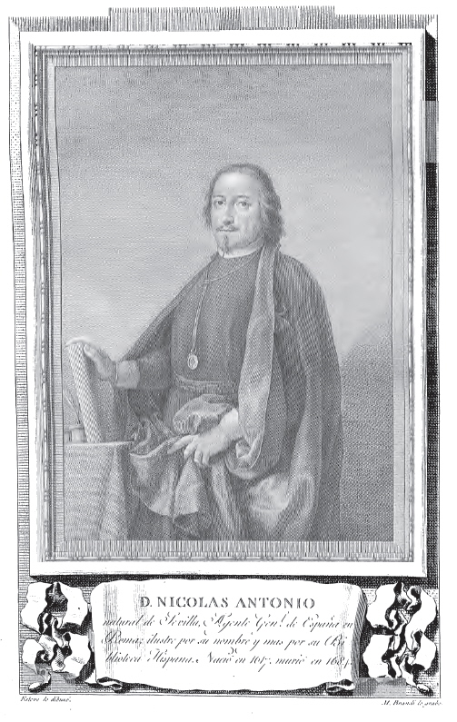 Retrato de Nicolás Antonio